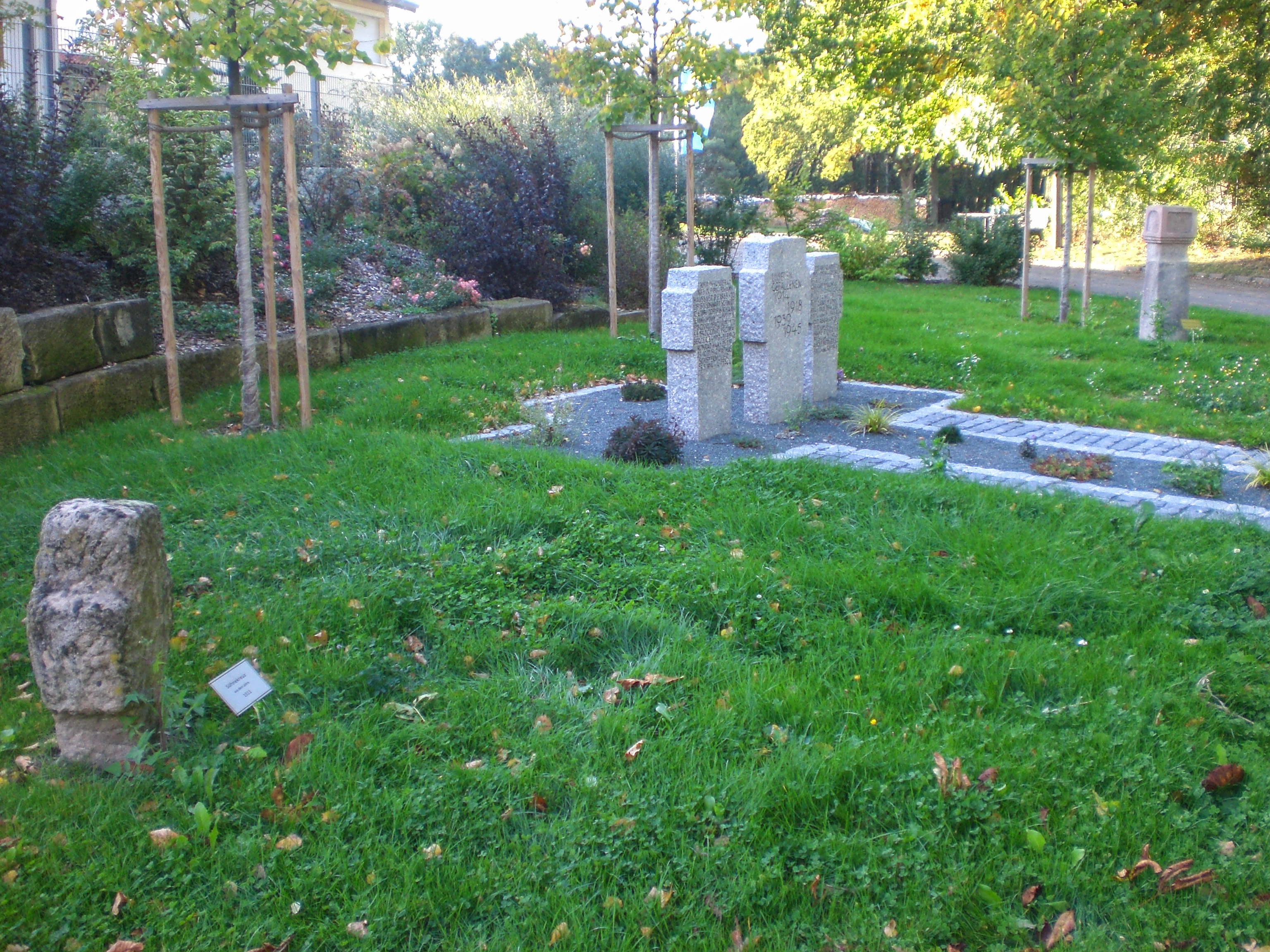 Steinkreuz, Sandstein, wohl spätmittelalterlich